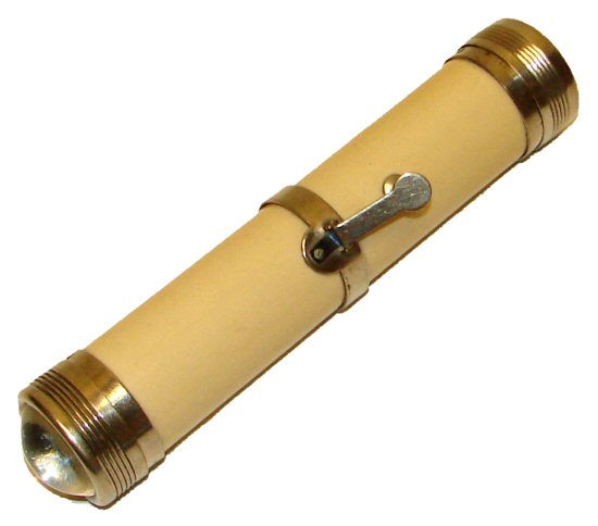 Linterna de Energizer